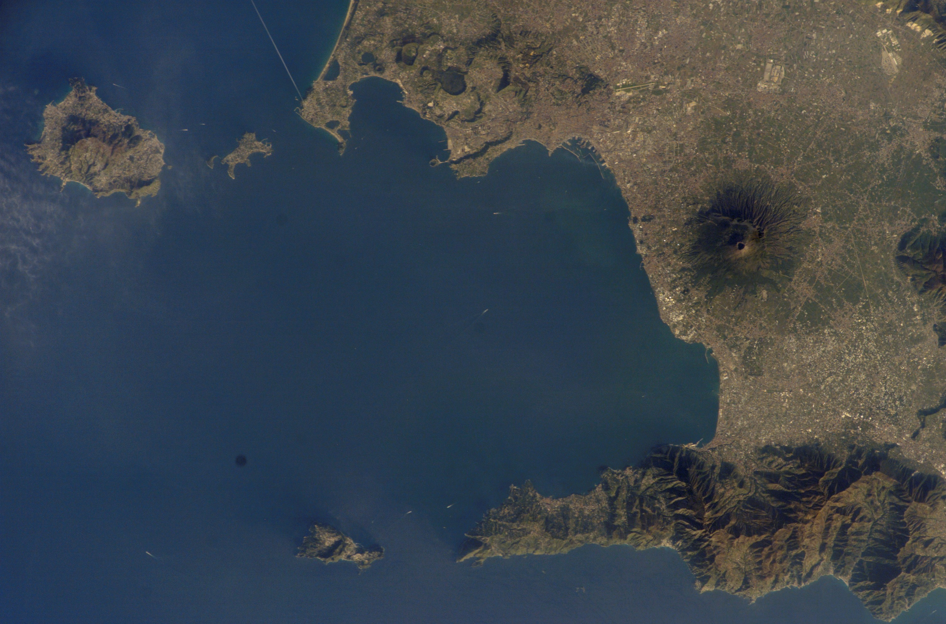 Isola d’Ischia, golfo di Napoli e Vesuvio.